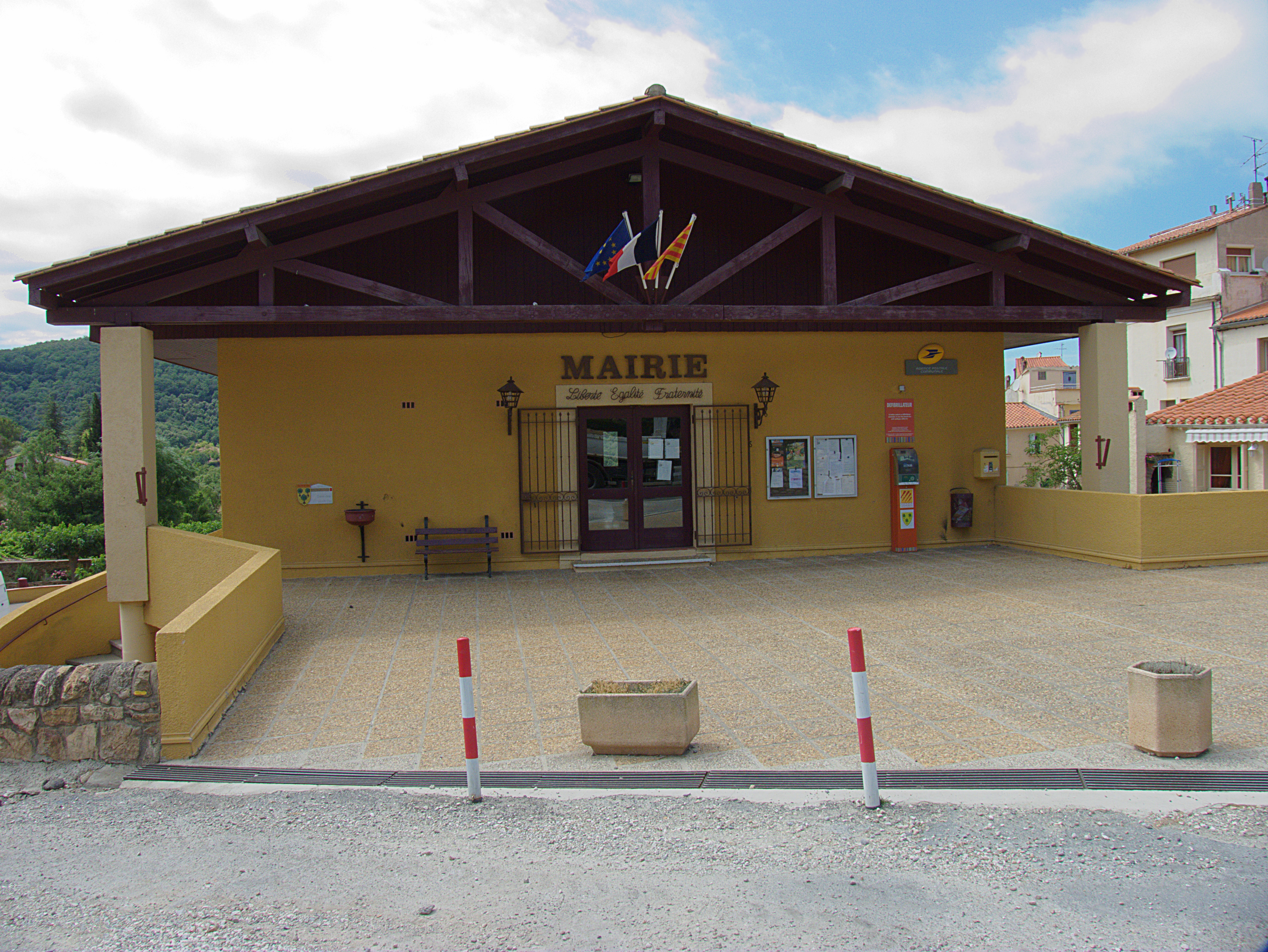 Mairie, Oms (Pyrénées-Orientales, Languedoc-Roussillon, France)